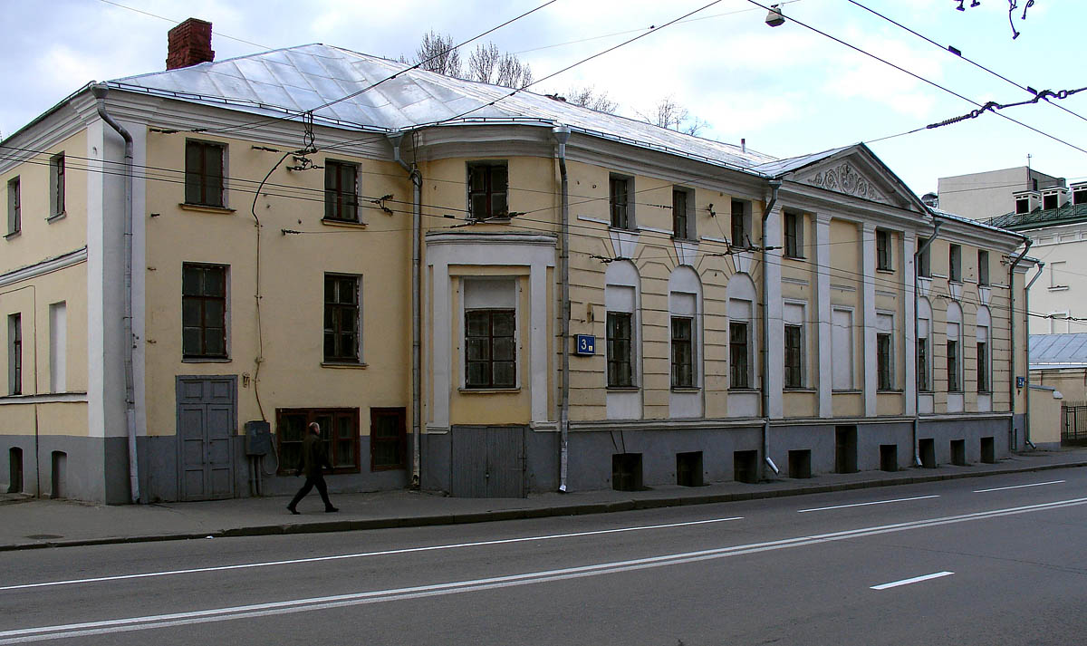 Spartakovskaya Street, Moscow.